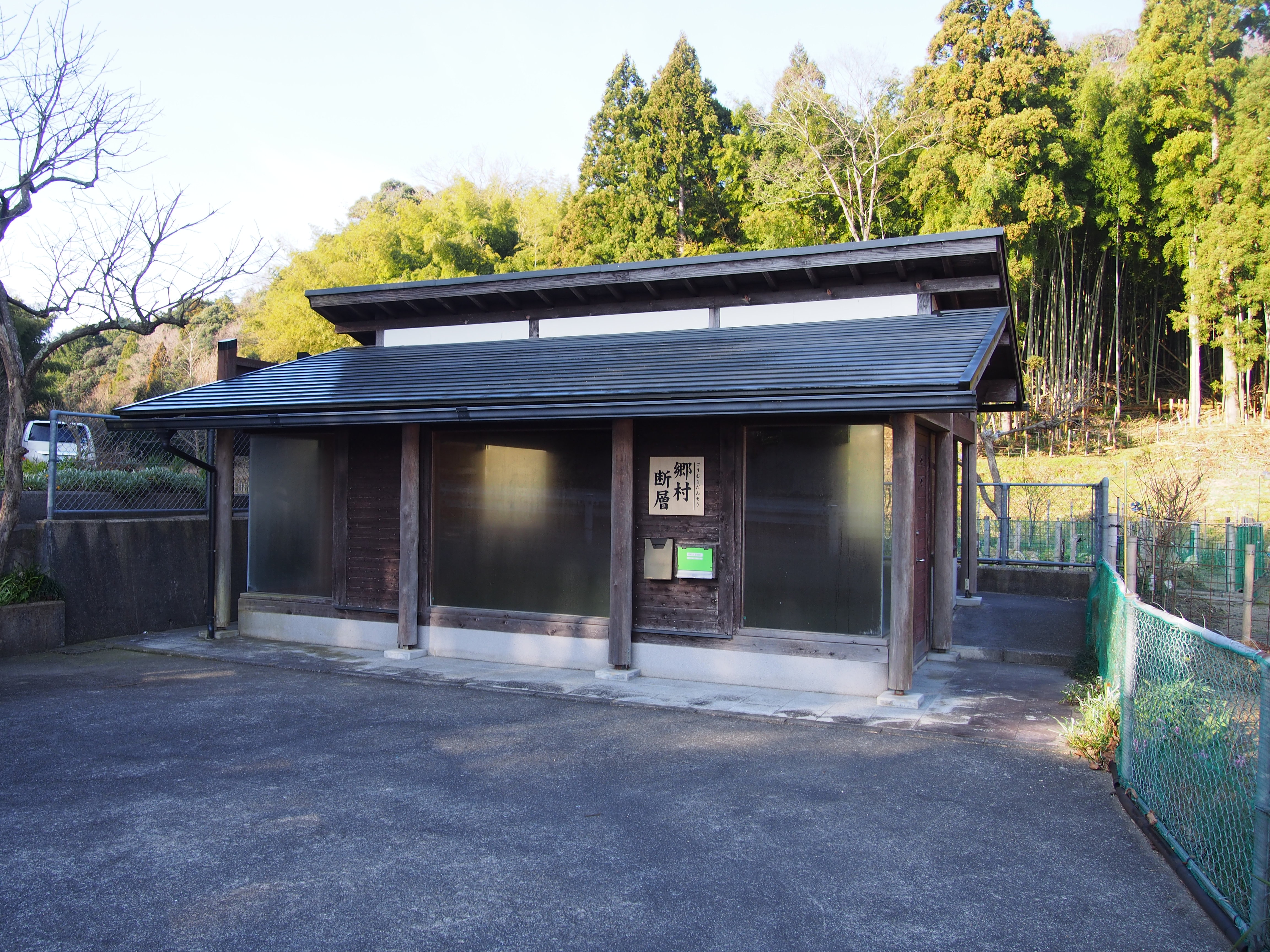 郷村断層(樋口)京都府京丹後市網野町郷 昭和2年3月7日北丹後地震(丹後震災)により発生した断層を保存する覆屋。